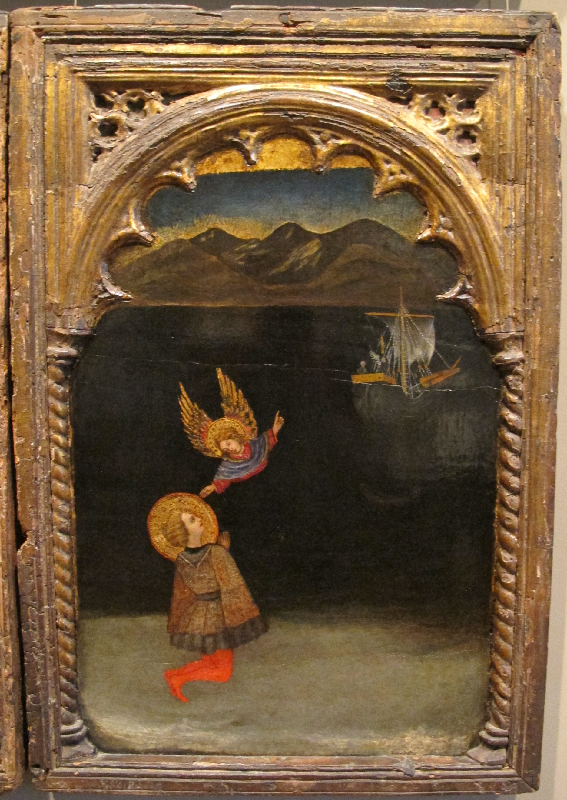 Giacomo di nicola da recanati, polittico di sant'elpidio a mare, 1425